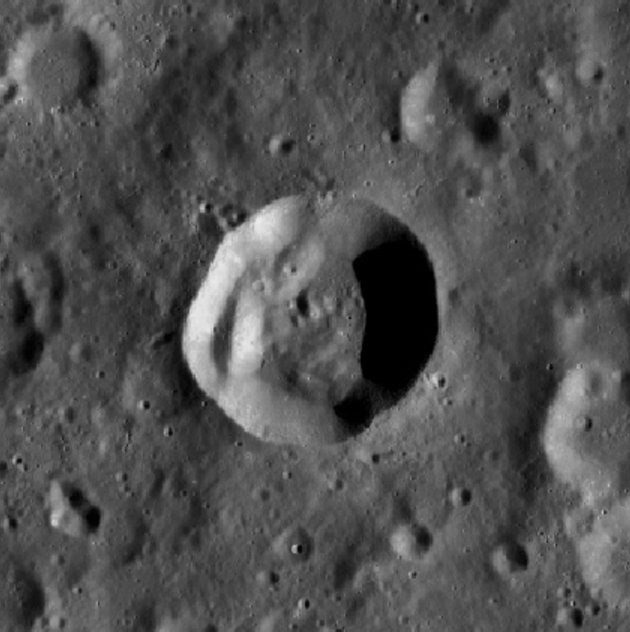 Cráter lunar Hayford. (Imagen LRO)